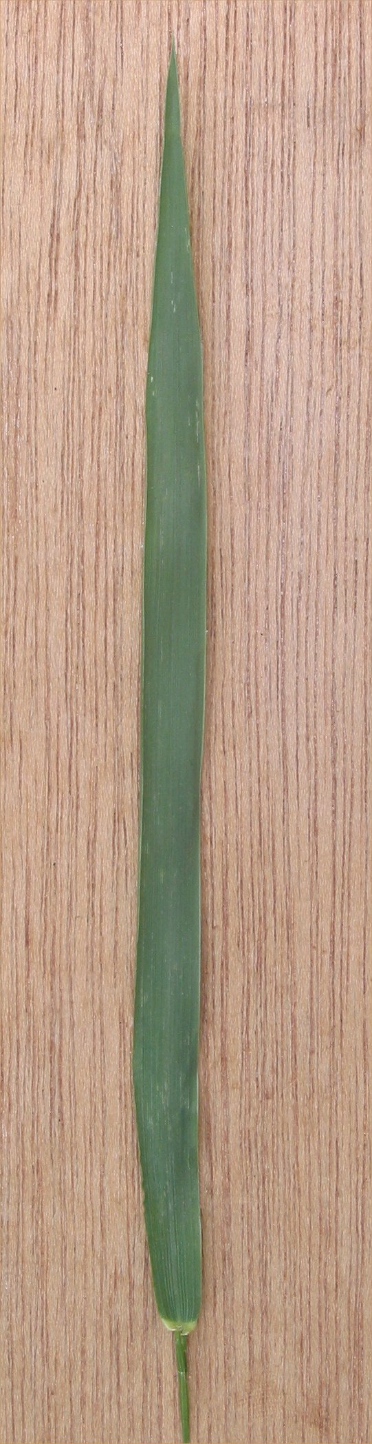 (nl: Kweek blad) Elytrigia repens leaf